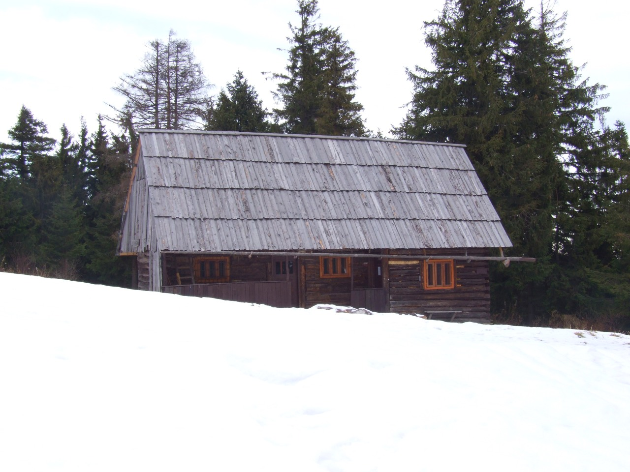 Prywatna bacówka na polanie Gorc Kamienicki